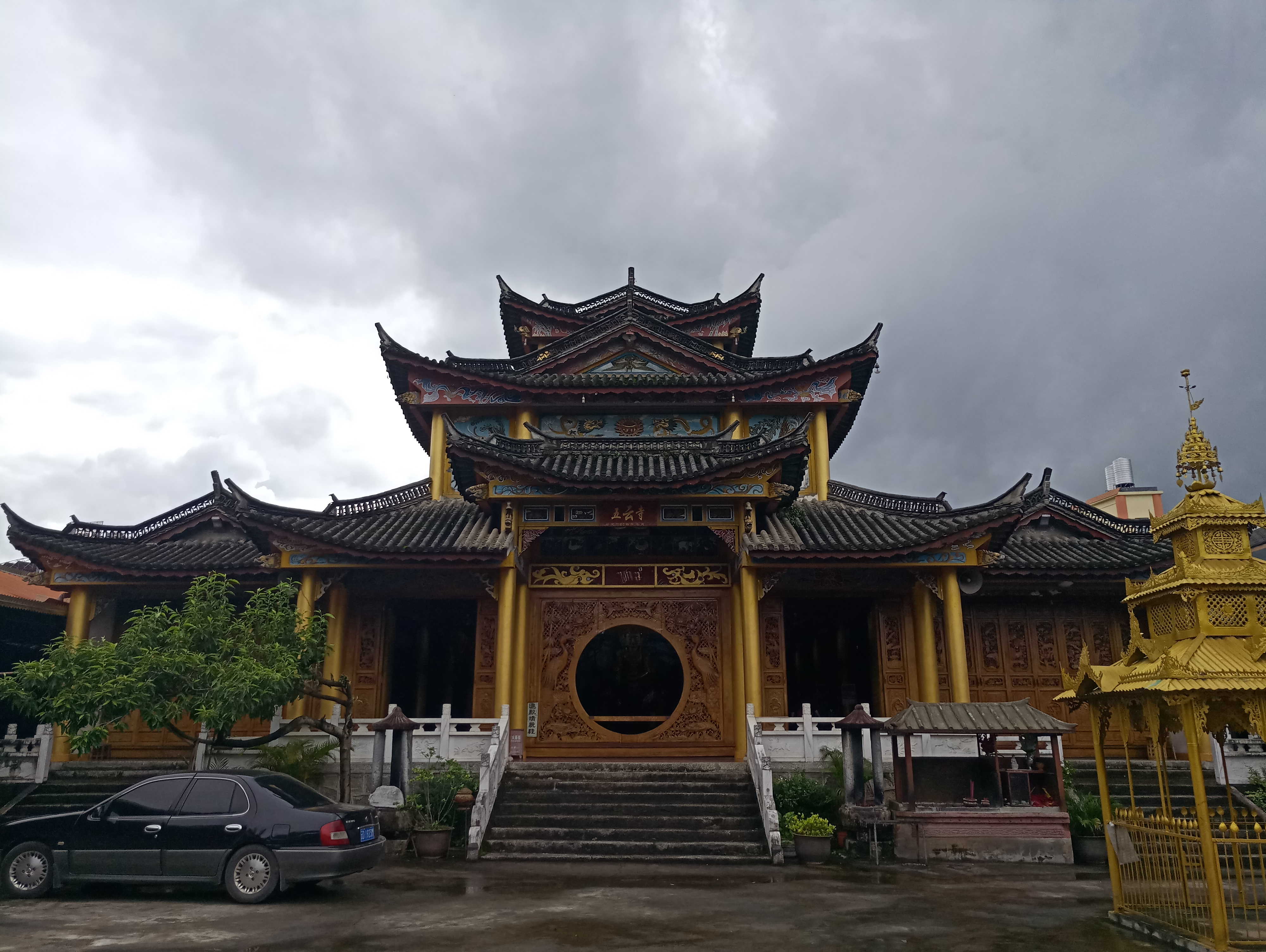 芒市五云寺